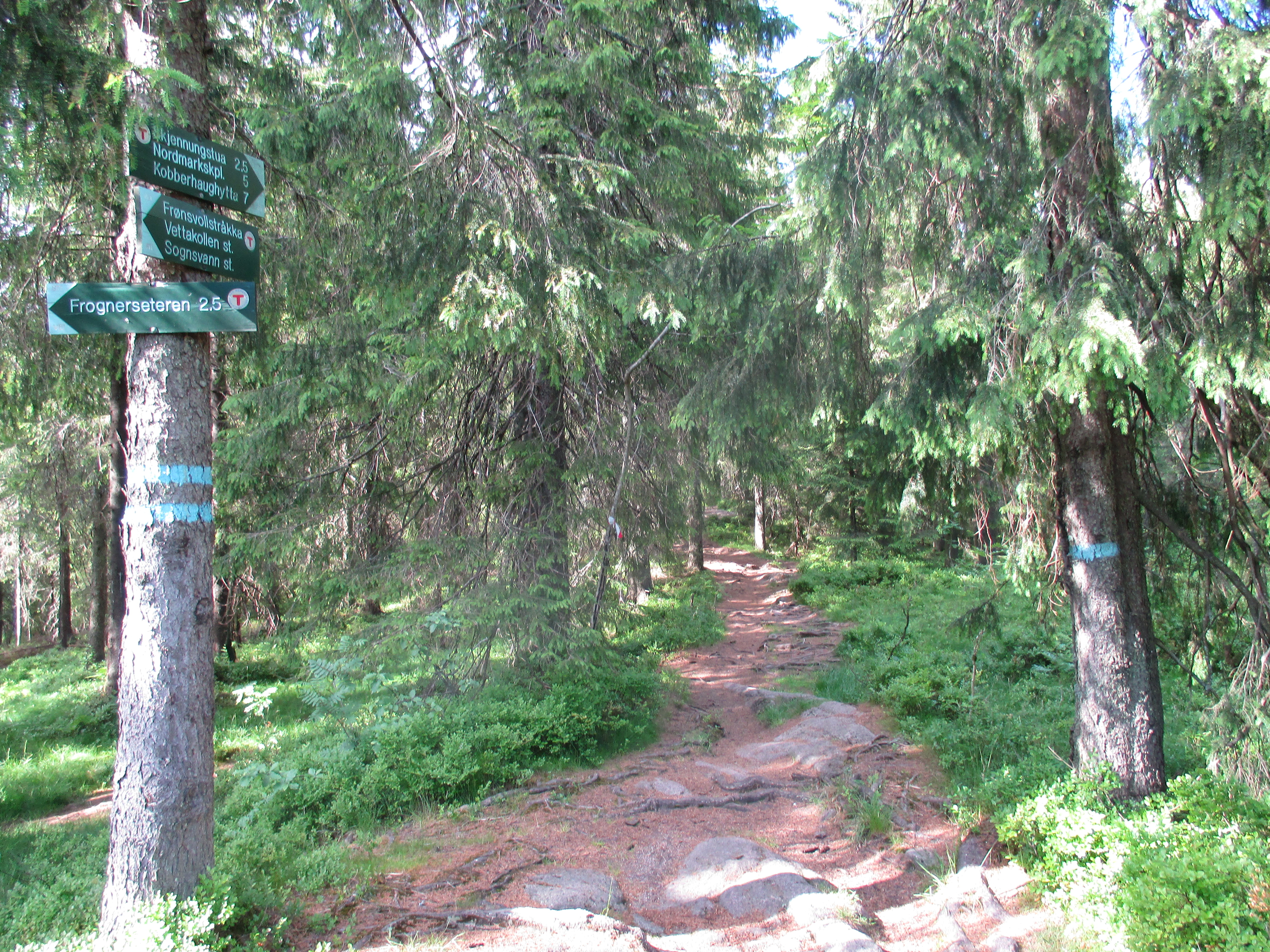 Frønsvollsåsen, nord for Frønsvollen